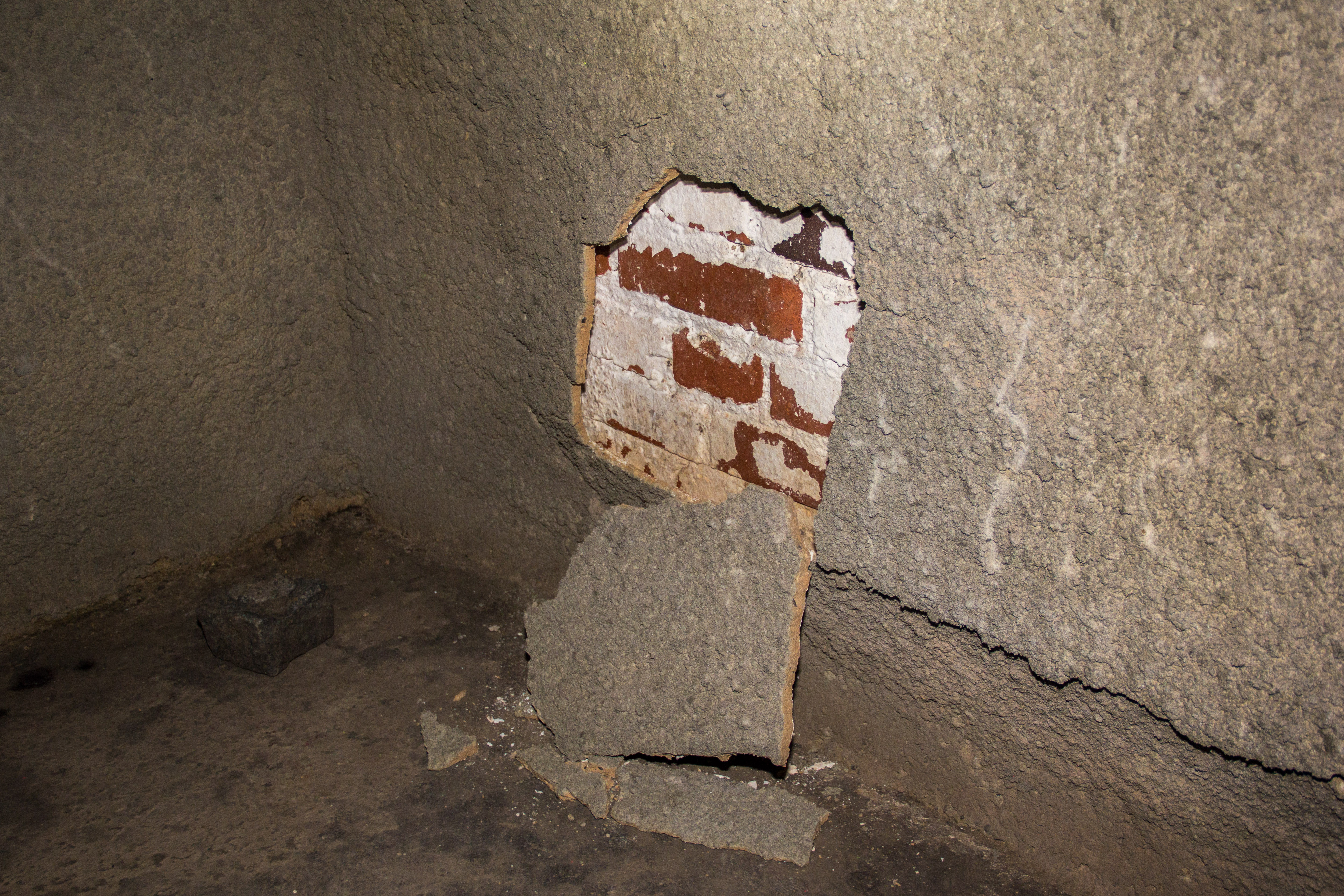 Tucherkeller, Nürnberg, ehemaliger Bierkeller, ehemaliger Bunker, Abgeplatzter Beton, Sicht auf ursprüngliche Ziegelmauer